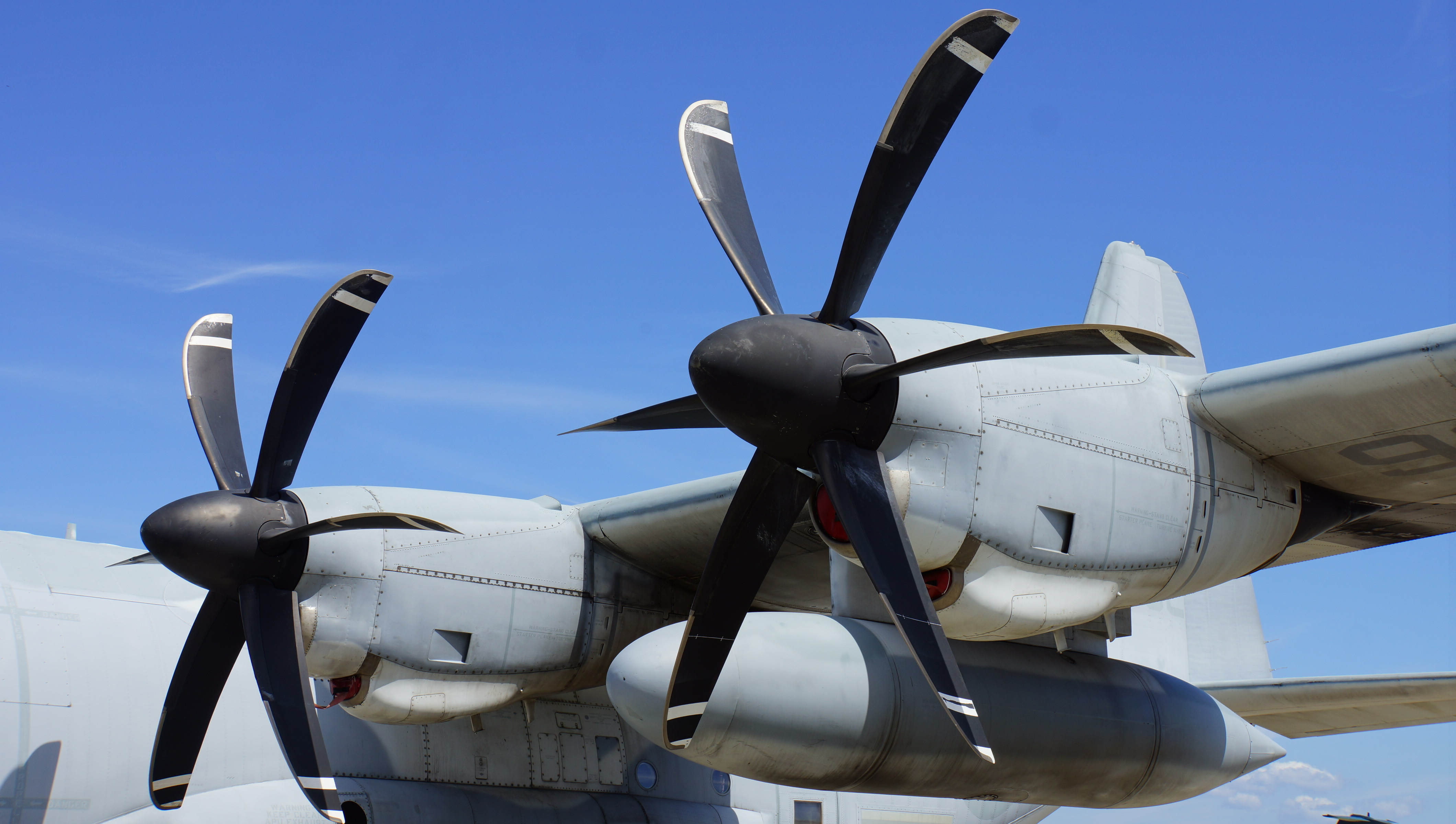 米海兵隊 KC-130Jハーキュリーズ空中給油機（QD-7982号機） ロールスロイス製AE2100D3ターボプロップエンジン。 14年9月14日 岩国航空基地にて。